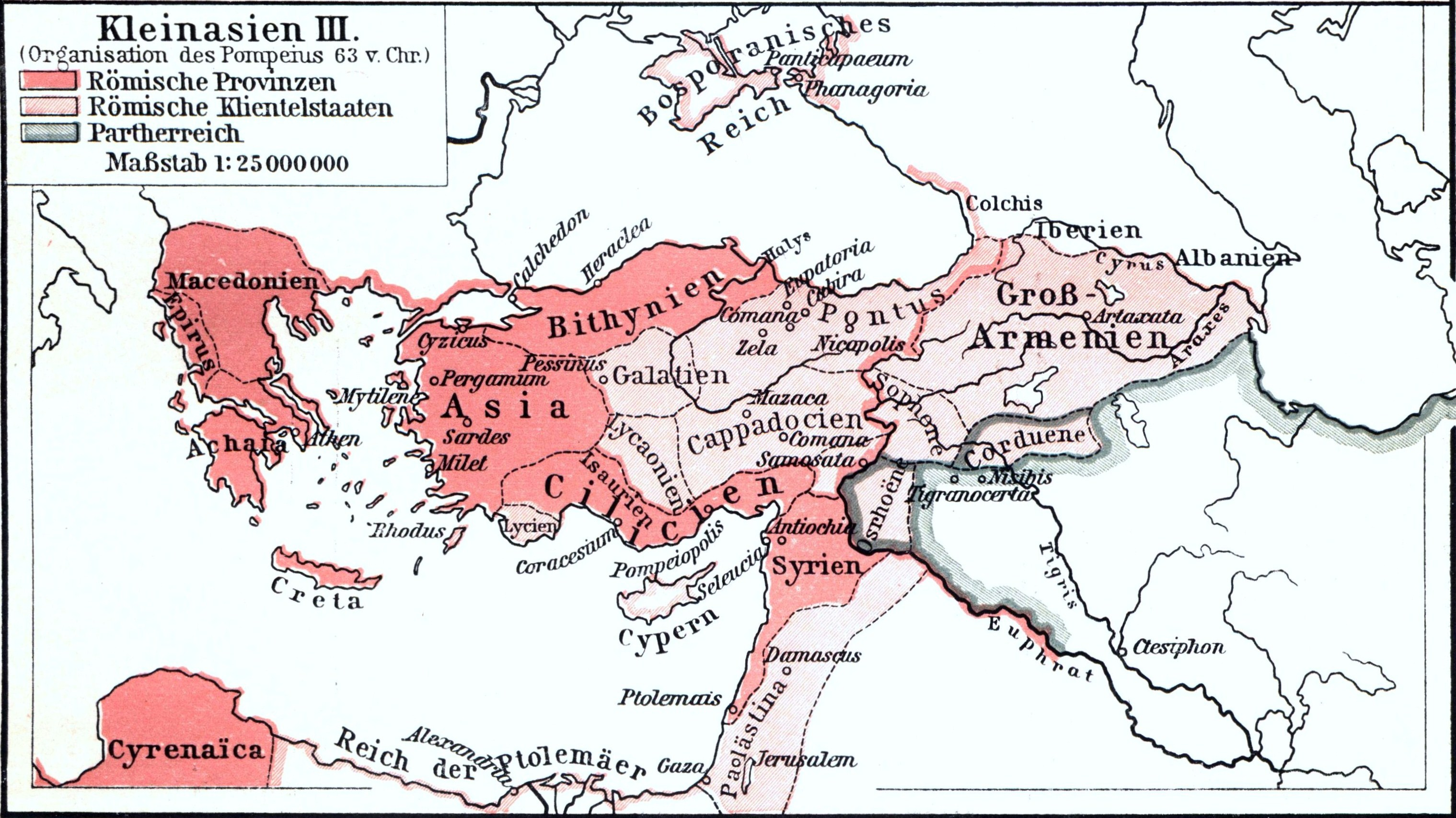 Karte von Kleinasien nach der Organisation des Pompeius 63 v. Chr.